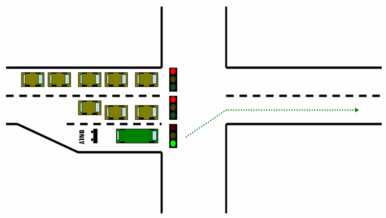 Example of a queue jump utilising a dedicated signal.